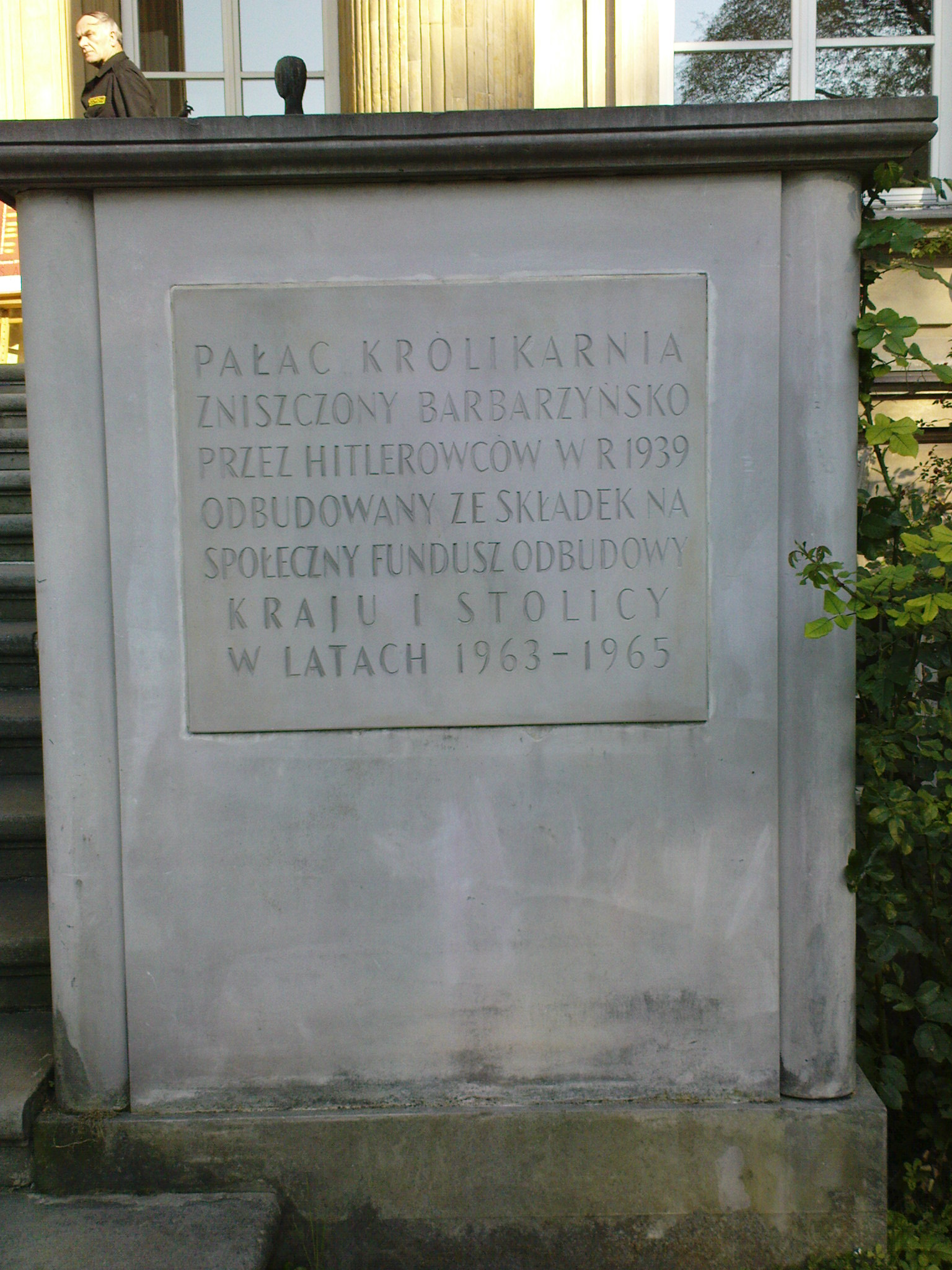 Królikarnia - pałac - na szczycie kamiennej balustrady ograniczającej pałacowe schody z prawej strony umieszczono tablicę informującą odrobinę o historii tego miejsca: "PAŁAC KRÓLIKARNIA ZNISZCZONY BARBARZYŃSKO PRZEZ HITLEROWCÓW W R 1939 ODBUDOWANY ZE SKŁADEK NA SPOŁECZNY FUNDUSZ ODBUDOWY KRAJU I STOLICY W LATACH 1936-1965".